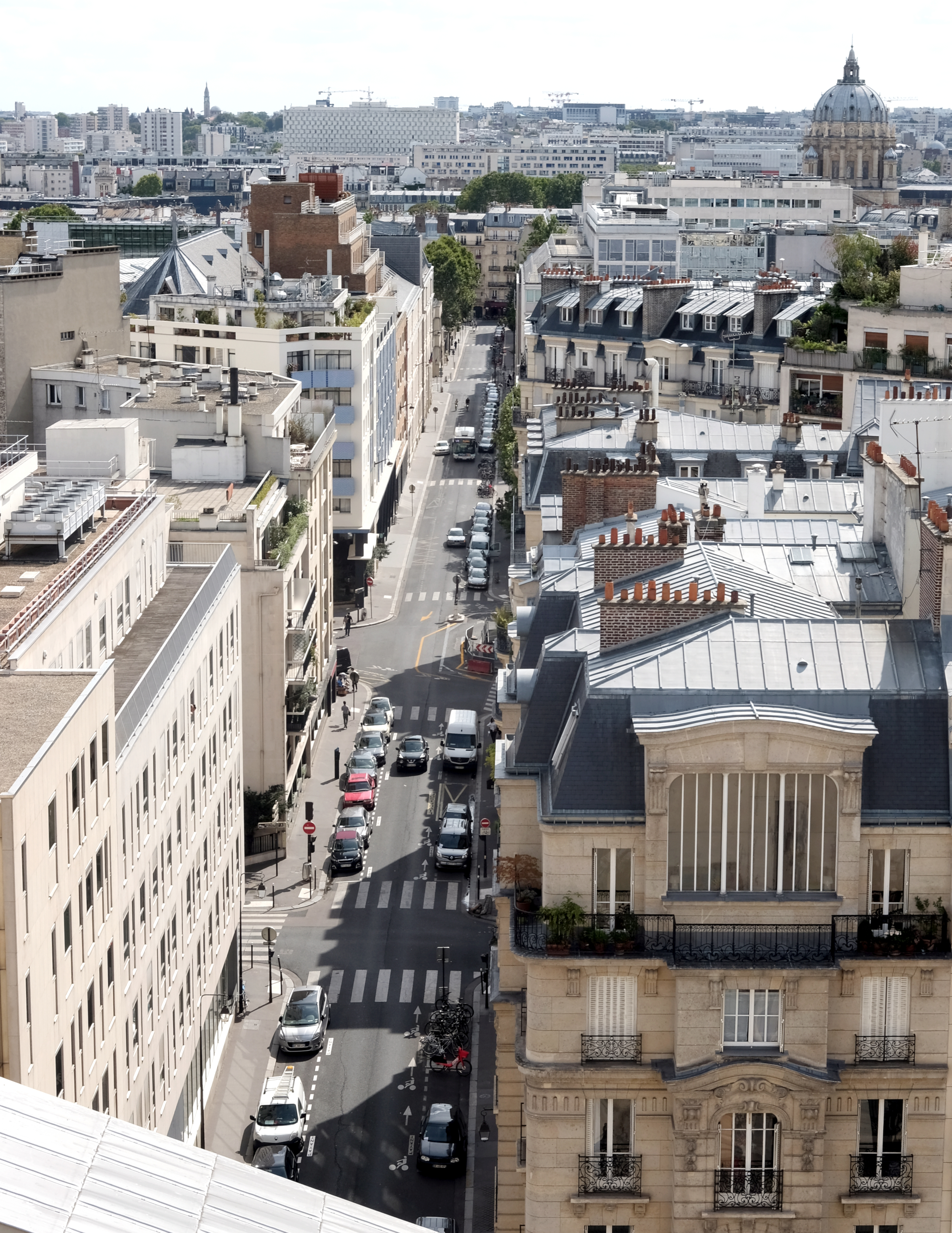 Paris V - Rue d'Ulm vue depuis la coupole du Panthéon ; en arrière-plan, la coupole du Val-de-Grâce.